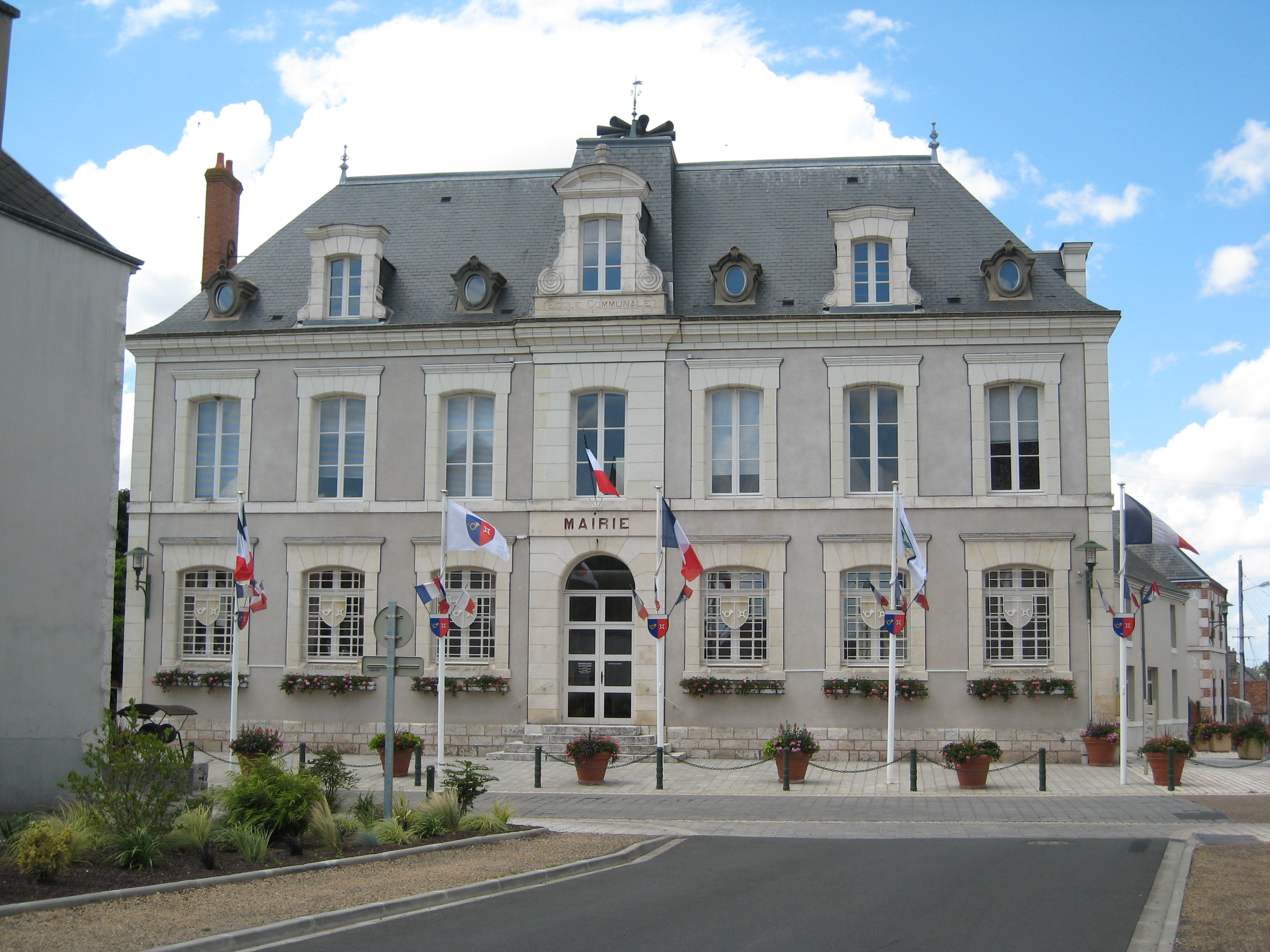 Mairie de Saint Laurent des Eaux, France